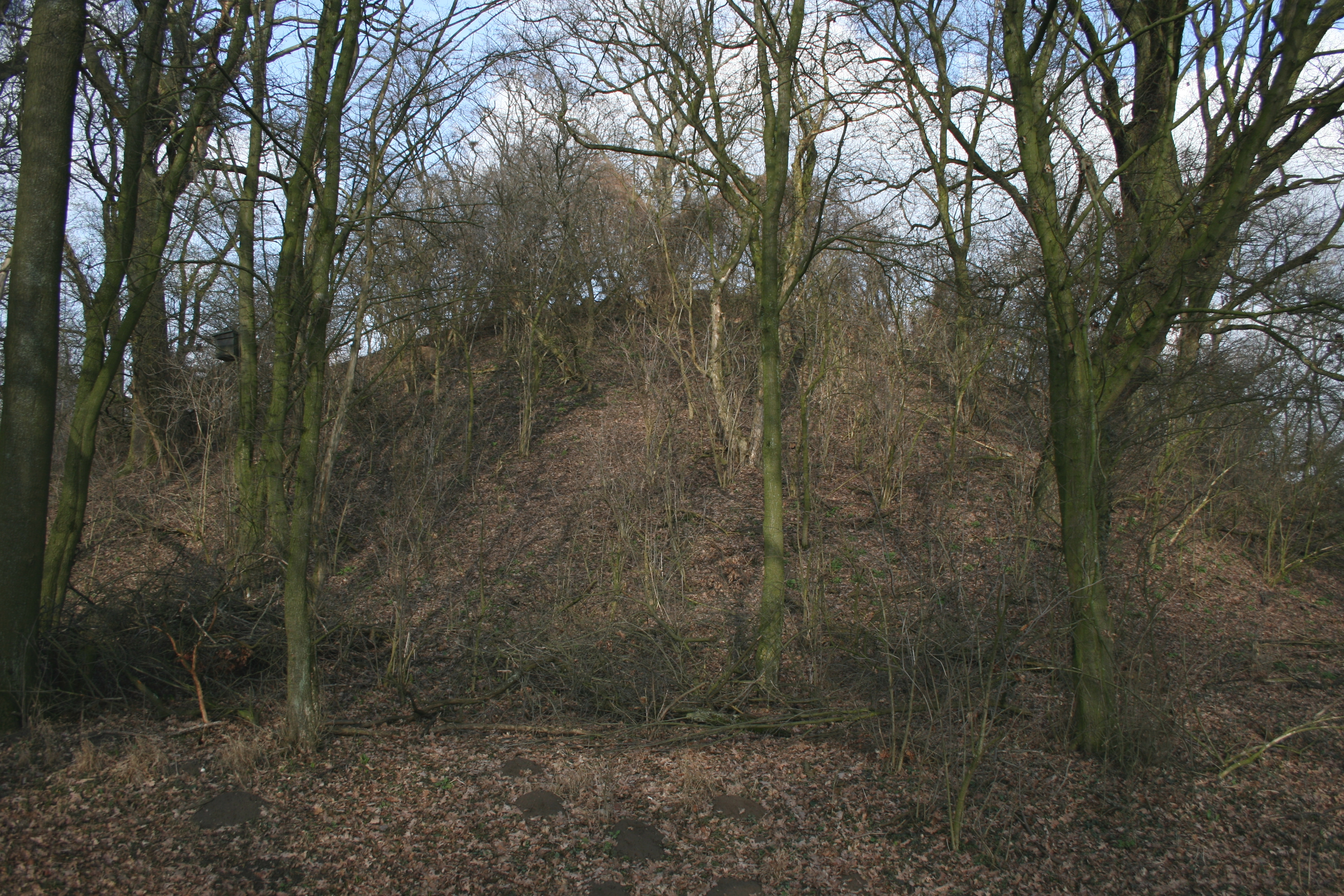 Weilerhügel bei Alsbach-Hähnlein. Ansicht des 11m hoch erhaltenen Turmhügels von Westen.